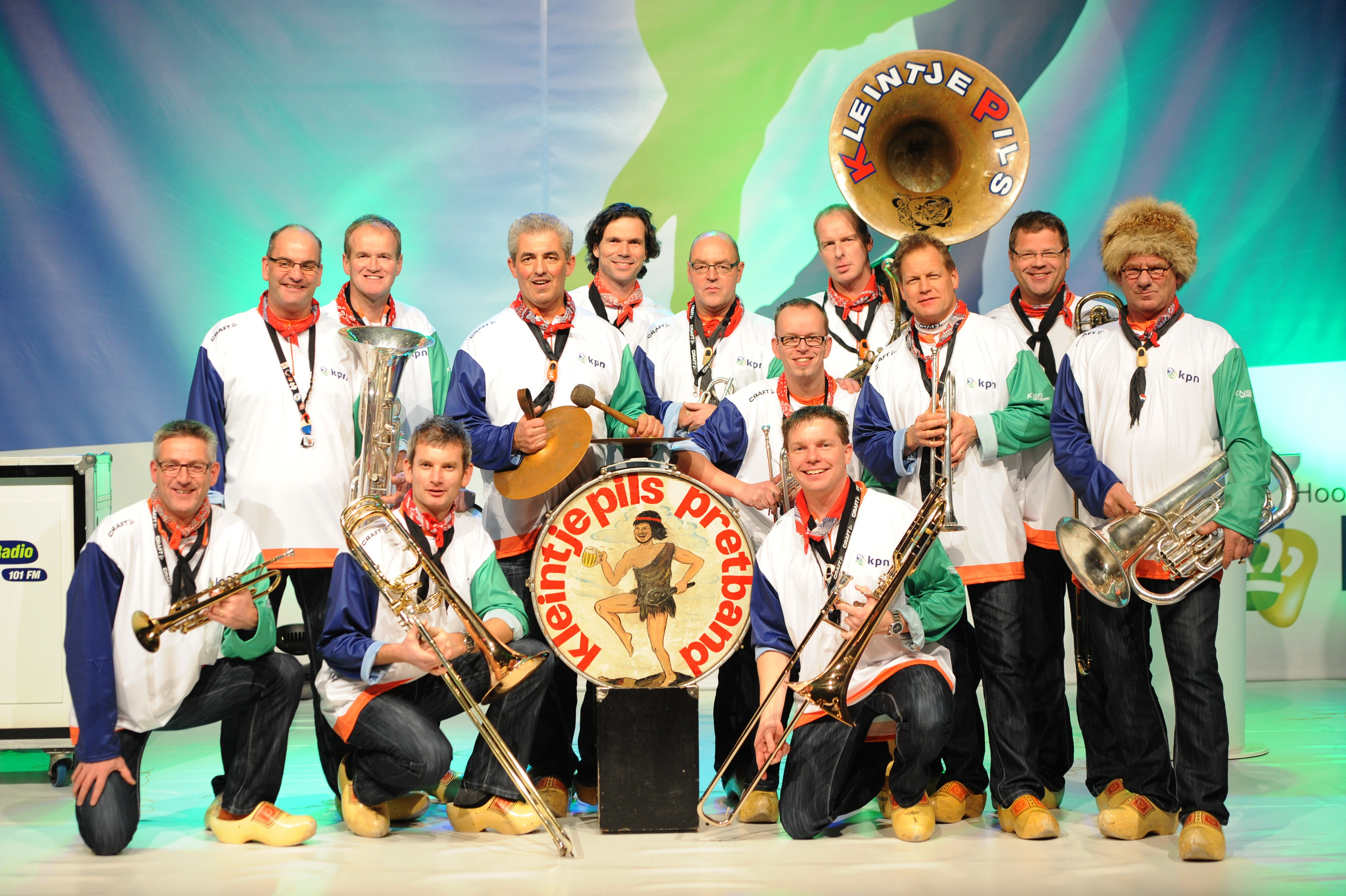 Kleintje Pils portret